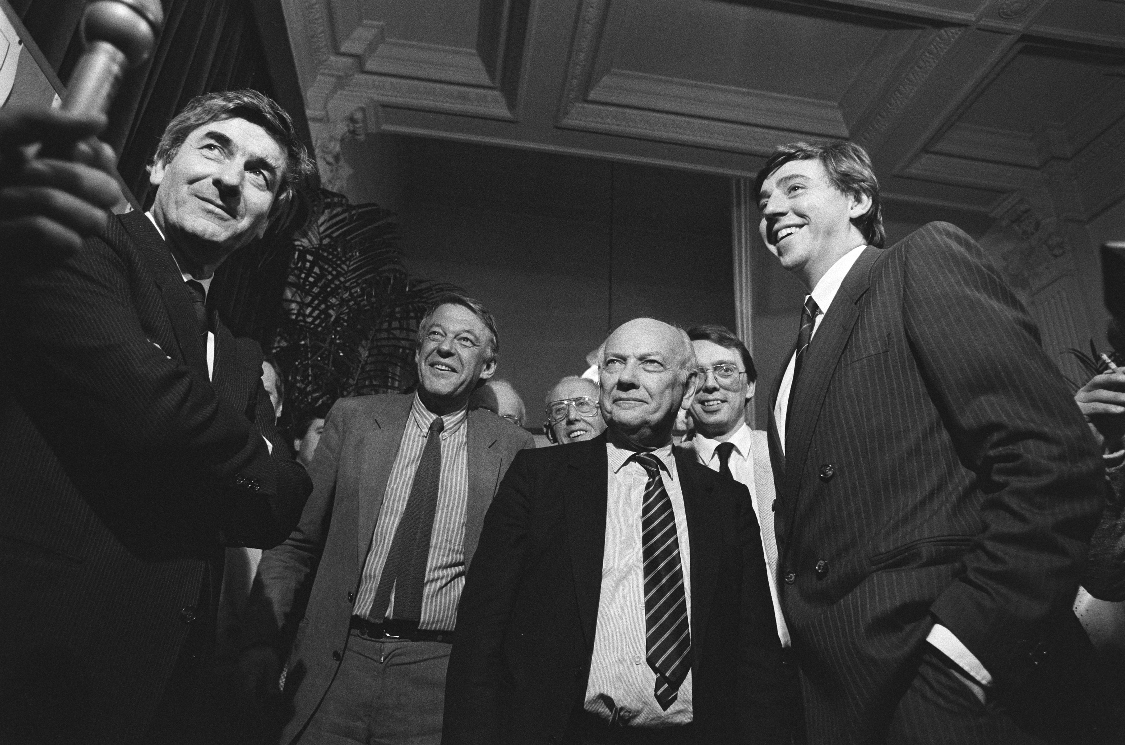 Collectie / Archief : Fotocollectie Anefo Reportage / Serie : 40 Jarig jubileum Humanistisch Verbond Beschrijving : 40 Jarig jubileum Humanistisch Verbond met o.a. Ruud Lubbers, Hans van Mierlo, Joop den Uyl, Rob Tielman (algemeen voorzitter Humanistisch Verbond), Ed Nijpels Datum : 4 maart 1986 Trefwoorden : jubilea, ministers-presidenten, parlementariërs, voorzitters Persoonsnaam : Lubbers, Ruud, Mierlo, Hans van, Nijpels, Ed, Tielman, Rob, Uyl, Joop den Fotograaf : Fotograaf Onbekend / Anefo, [onbekend] Auteursrechthebbende : Nationaal Archief Materiaalsoort : Negatief (zwart/wit) Nummer archiefinventaris : bekijk toegang 2.24.01.05 Bestanddeelnummer : 933-5847